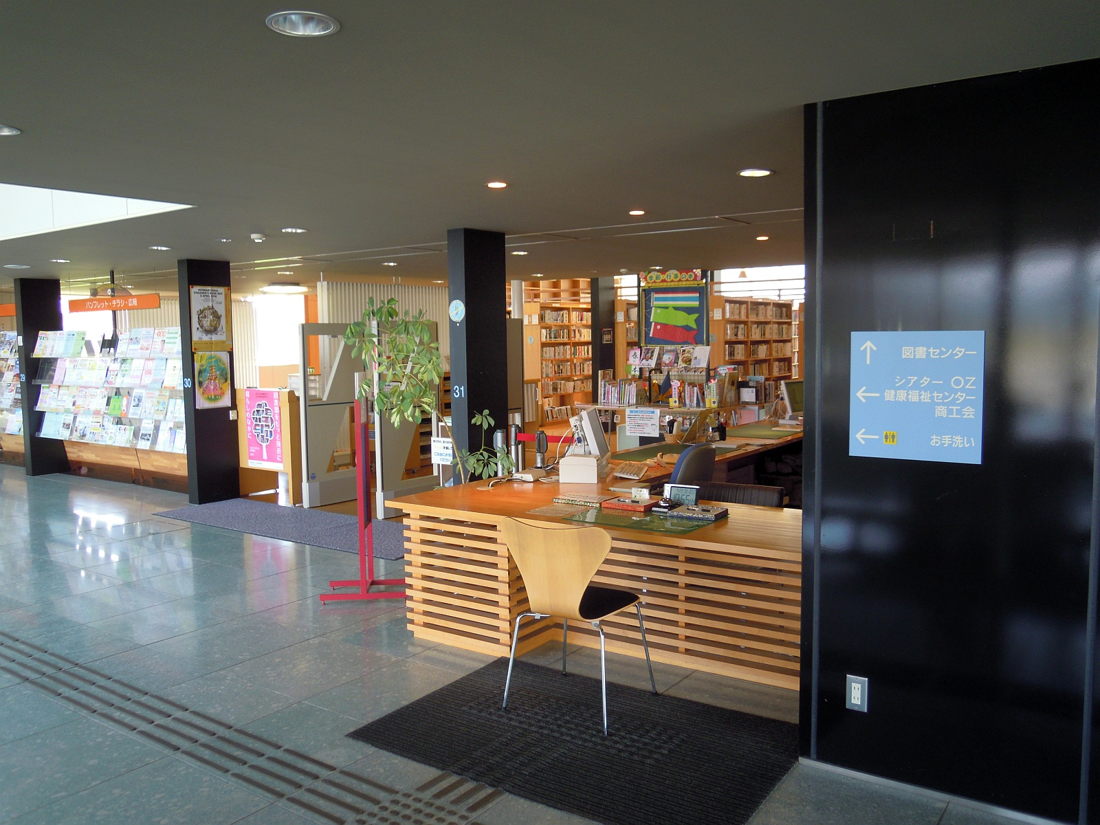 山形県酒田市のひらたタウンセンター内にある酒田市ひらた図書センターの入口付近。